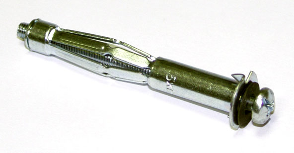 Molly bolt